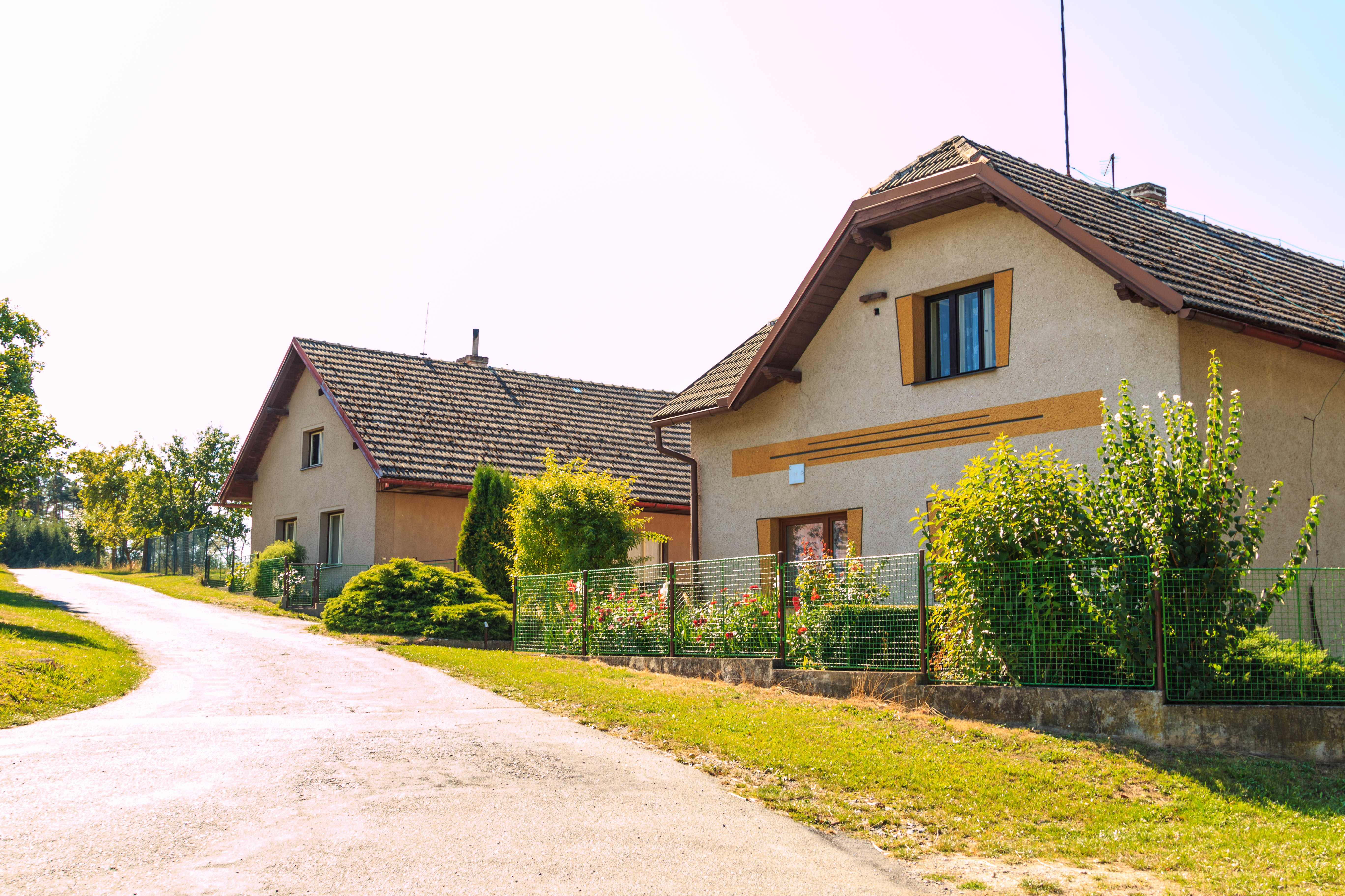 Chlum u Hluboké čp. 6